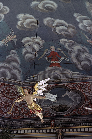 Takmålning.